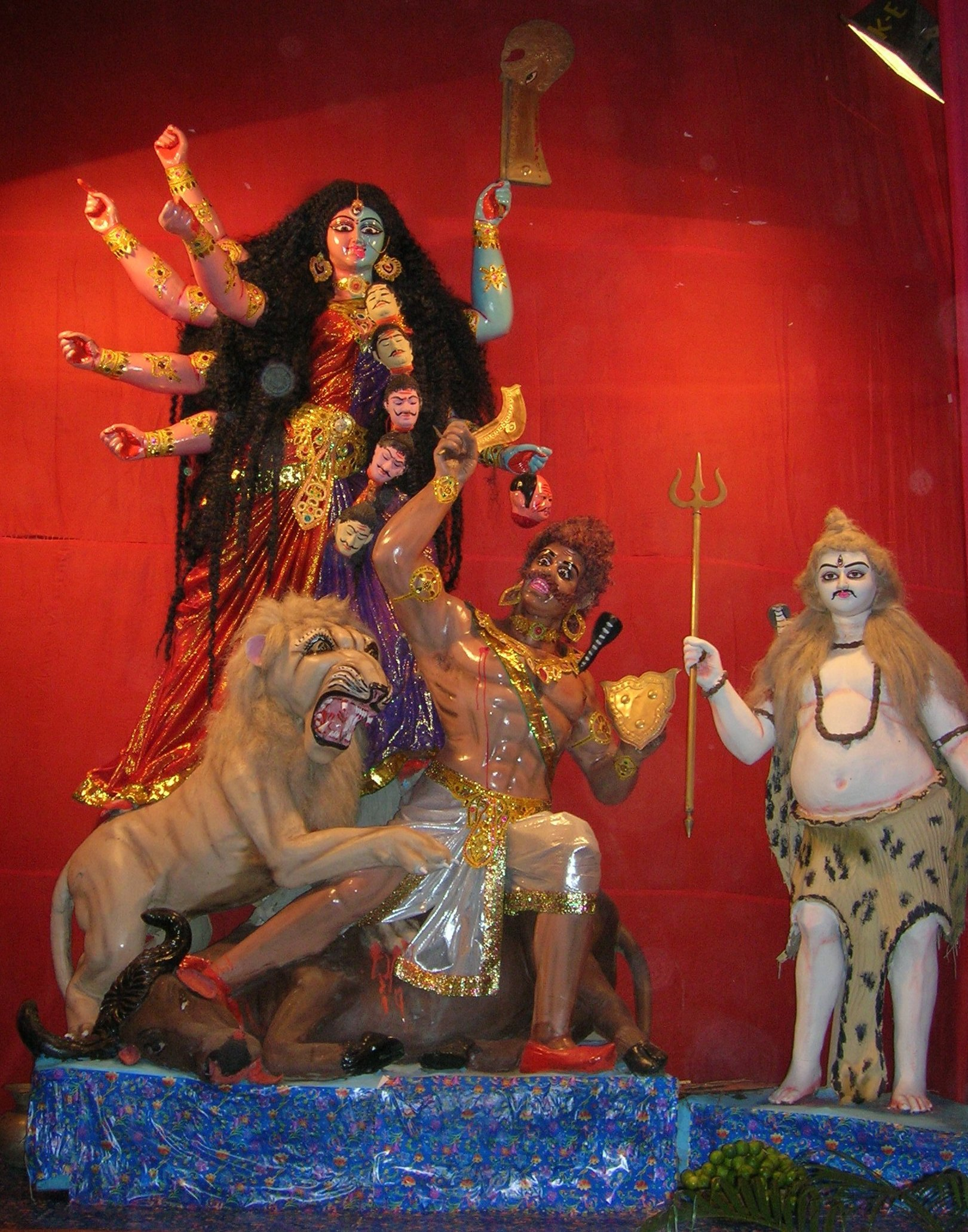 Durga Kali, an amalgamation of Durga and Kali, at a South Kolkata Kali Puja Pandal/দুর্গাকালী, দুর্গা ও কালীর যৌথ রূপ, দক্ষিণ কলকাতার চেতলার একটি কালীপূজা মণ্ডপে